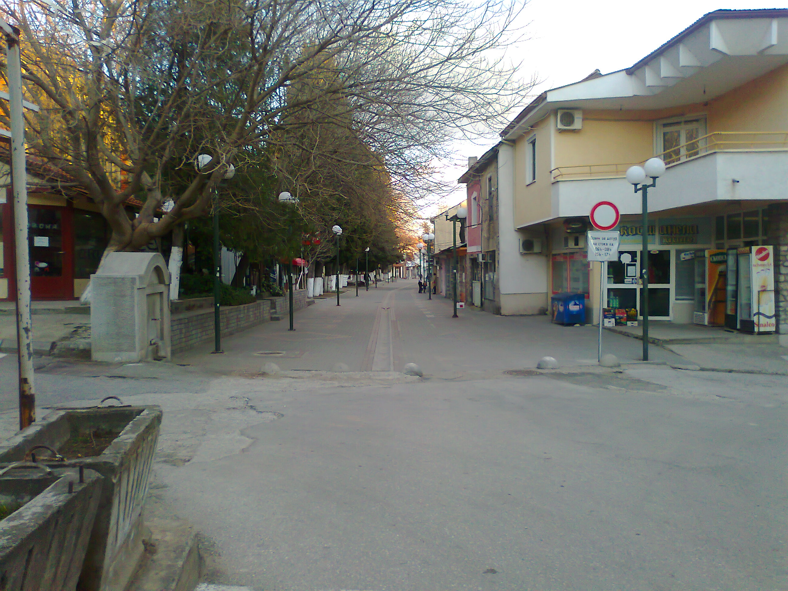 Valandovo